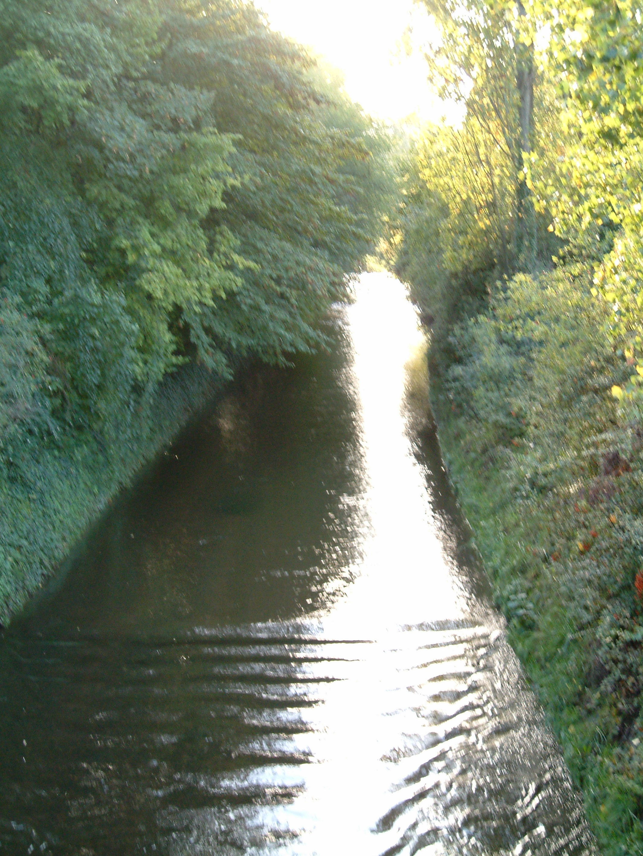 Rehbach in Neustadt an der Weinstraße, selbst fotografiert am 2006-10-07 und freigegeben durch Benutzer:Mundartpoet